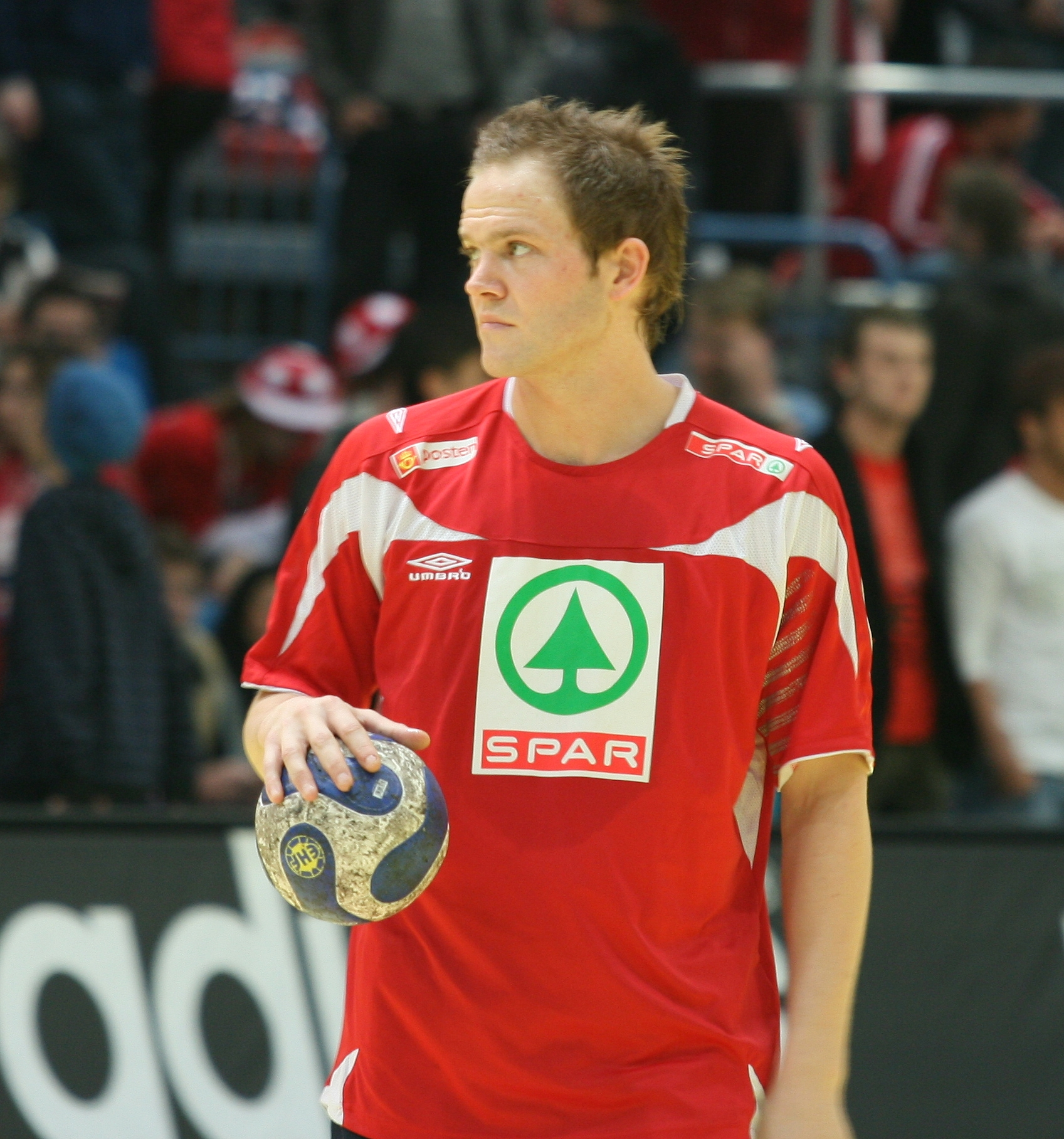 Kjetil Strand, Norwegian handballer, in Stavanger